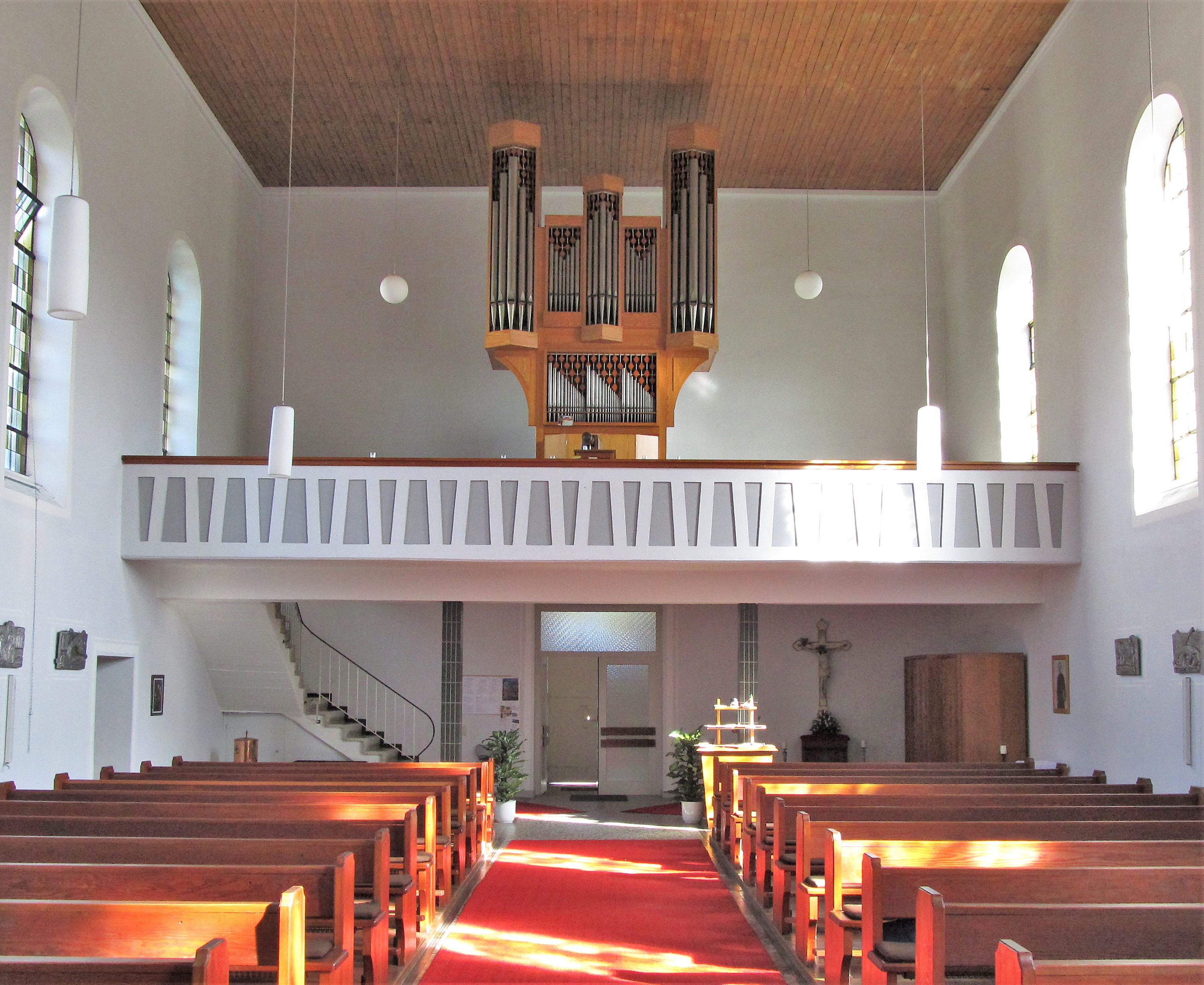 Blick vom Altarraum zur Empore mit dem Orgelprospekt der katholischen Pfarrkirche St. Pirminius in Walsheim, einem Ortsteil der Gemeinde Gersheim, Saarland